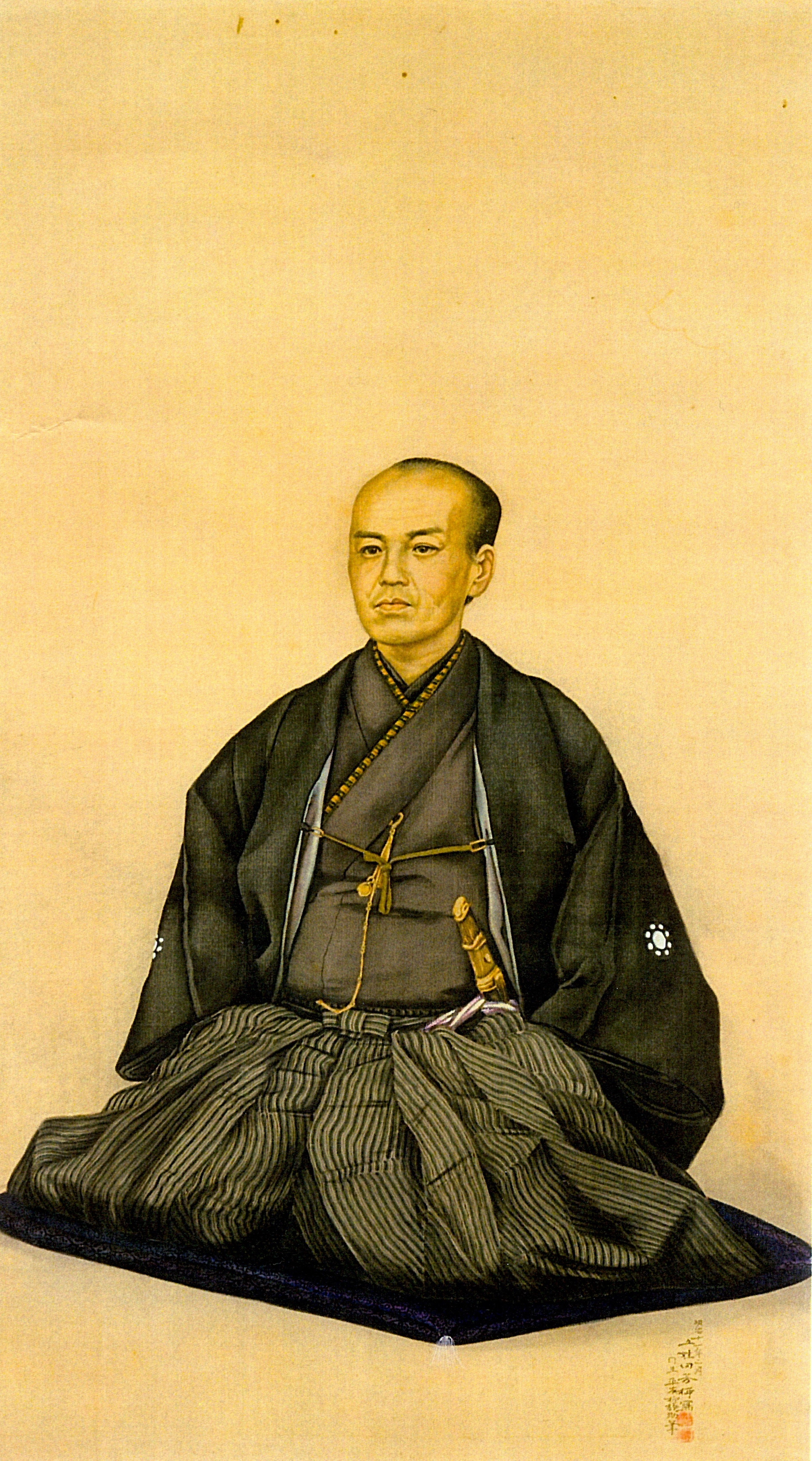 肥後熊本藩11代藩主・細川韶邦の肖像画。